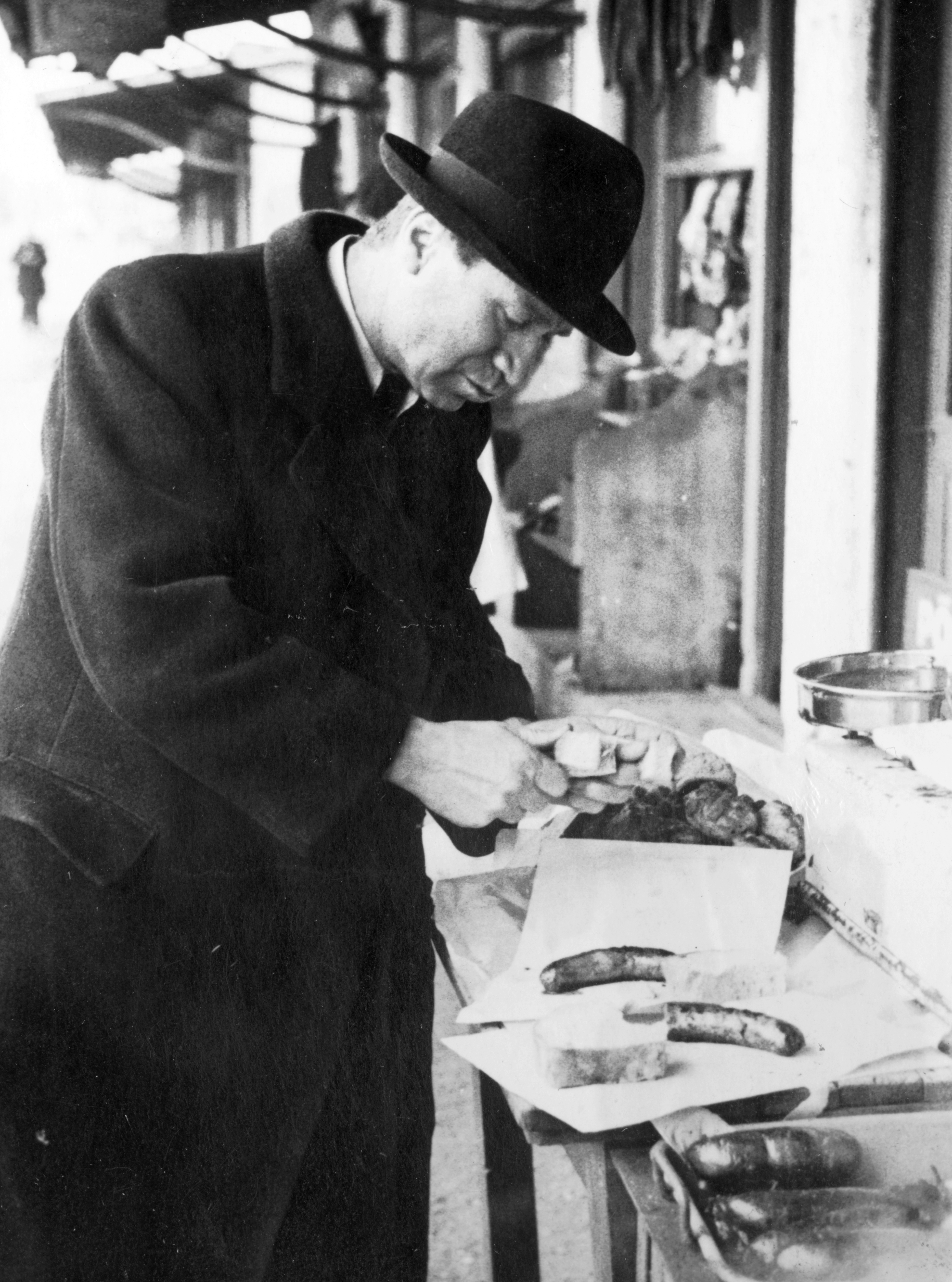 Bihari József színművész